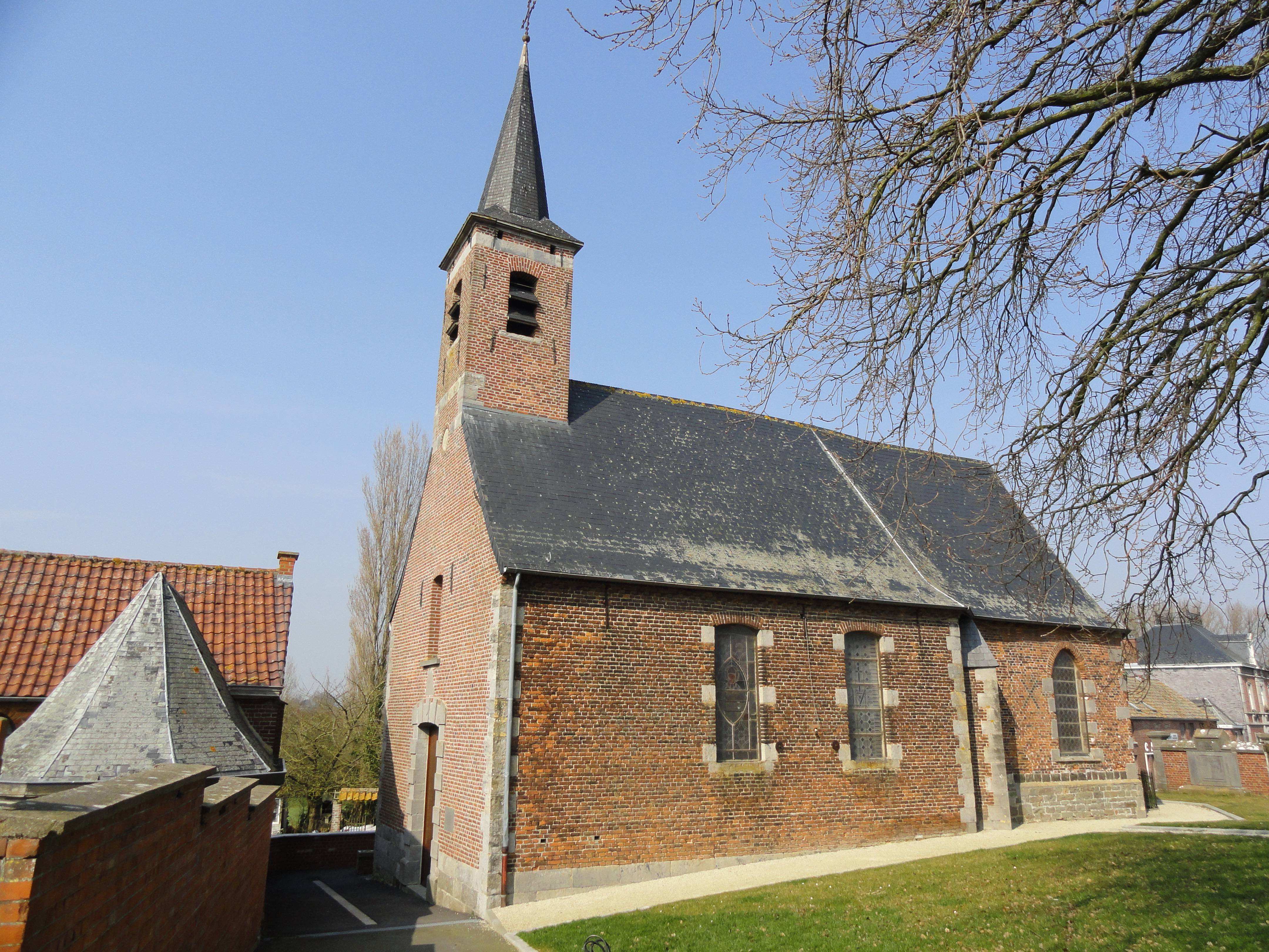 Chapelle Notre Dame, située à 7911 Moustier